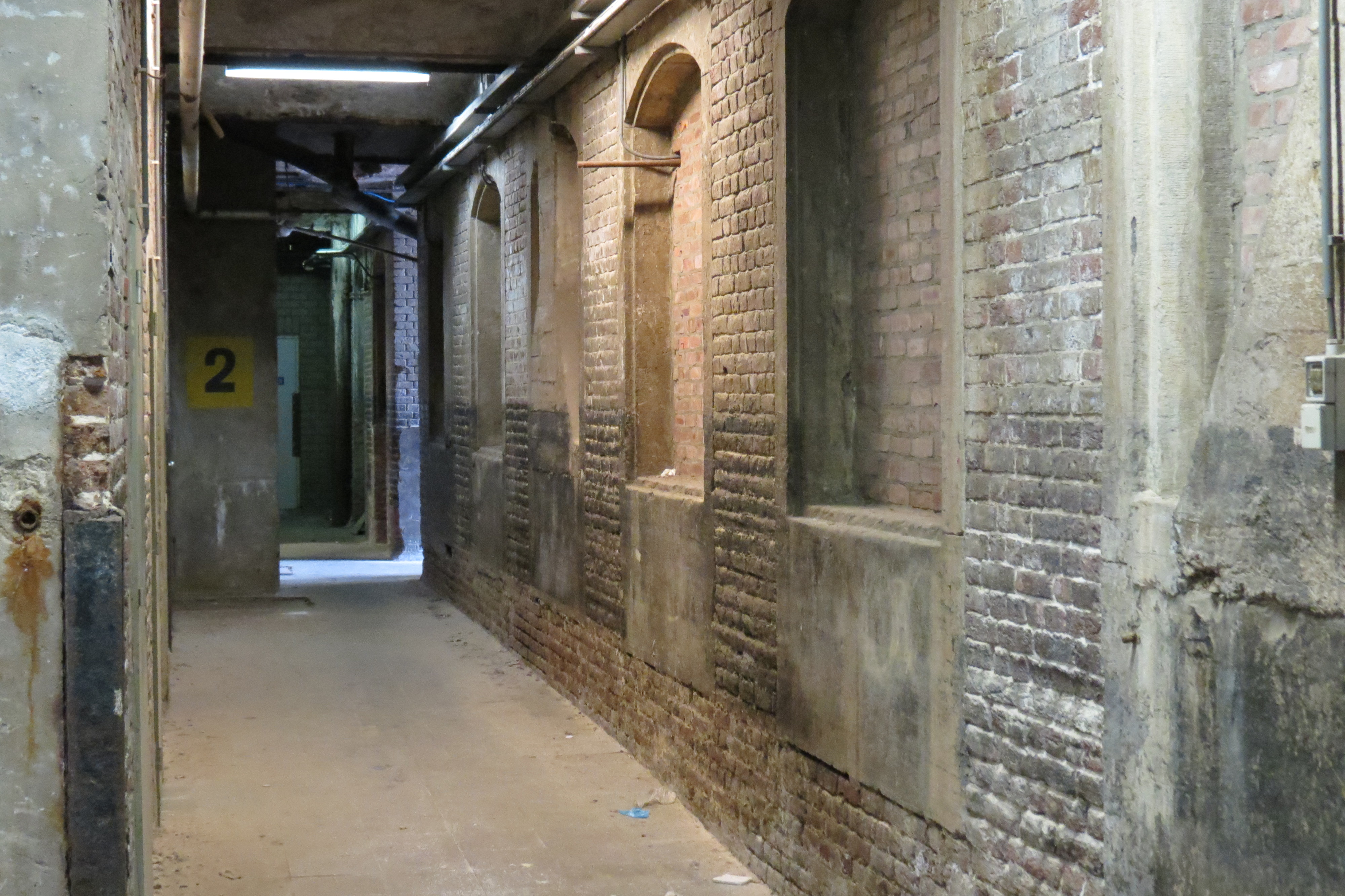 De foto is genomen van west naar oost binnen het fabriekscomplex. Rechts is de voormalige kloostermuur.